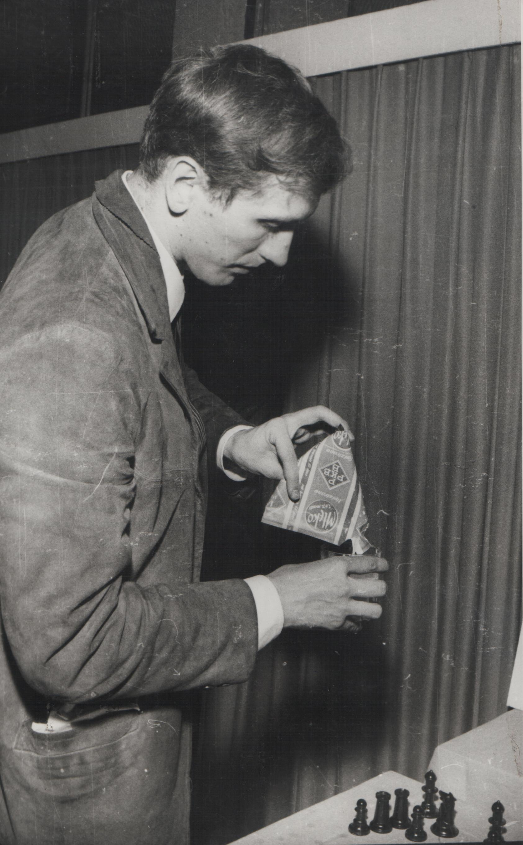 Bobi Fišer u Beogradu.foto: Stevan Kragujević (po odobrenju kćerke Tanje Kragujević)